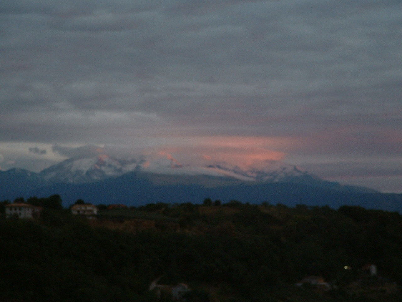 Maiella at dusk